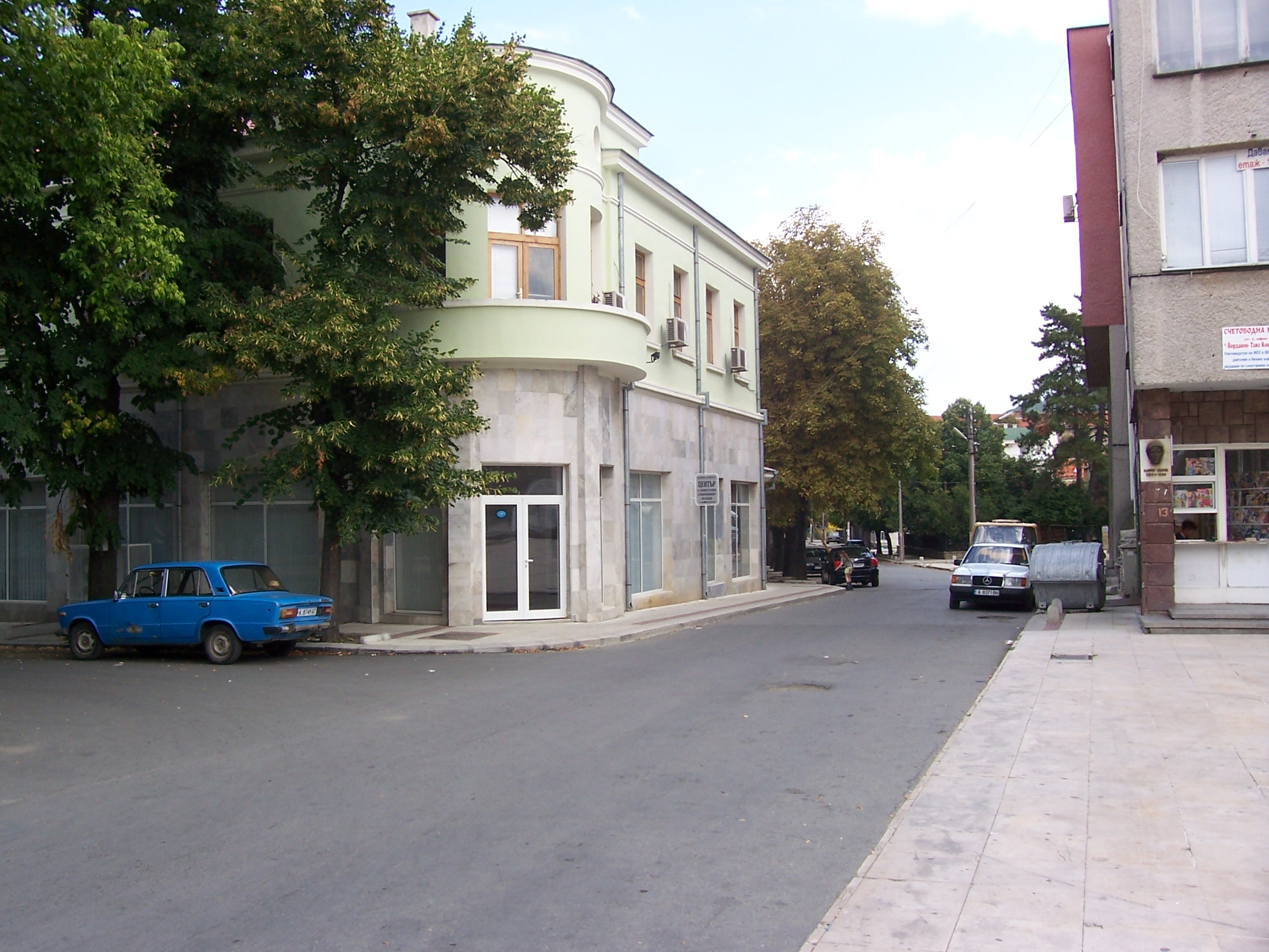 Втори корпус на Община Карнобат, Център за обслужване на граждани и Зала за сватби; © 2006 Димитър Колев